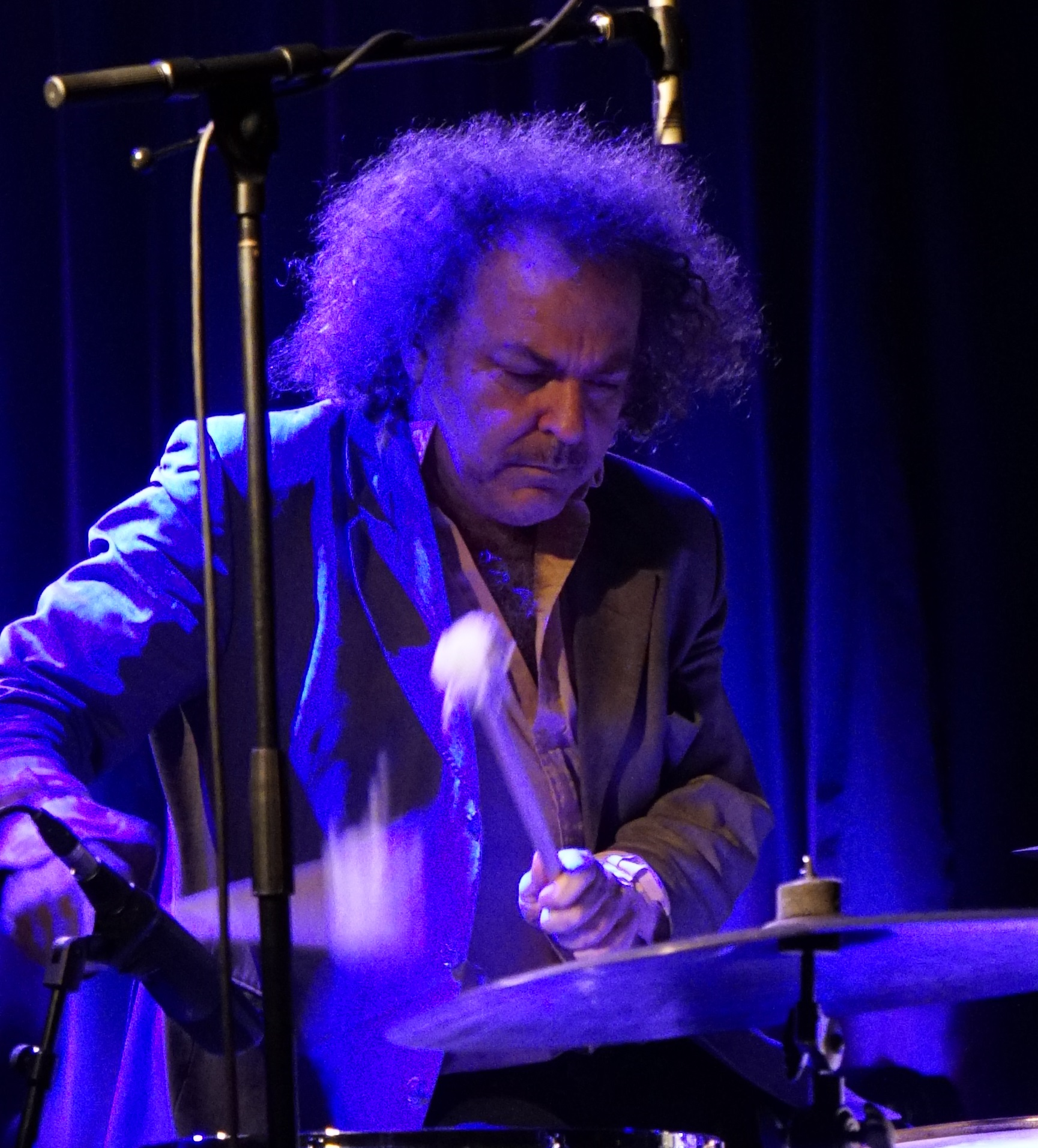 en concert à la Cartonnerie de Reims.